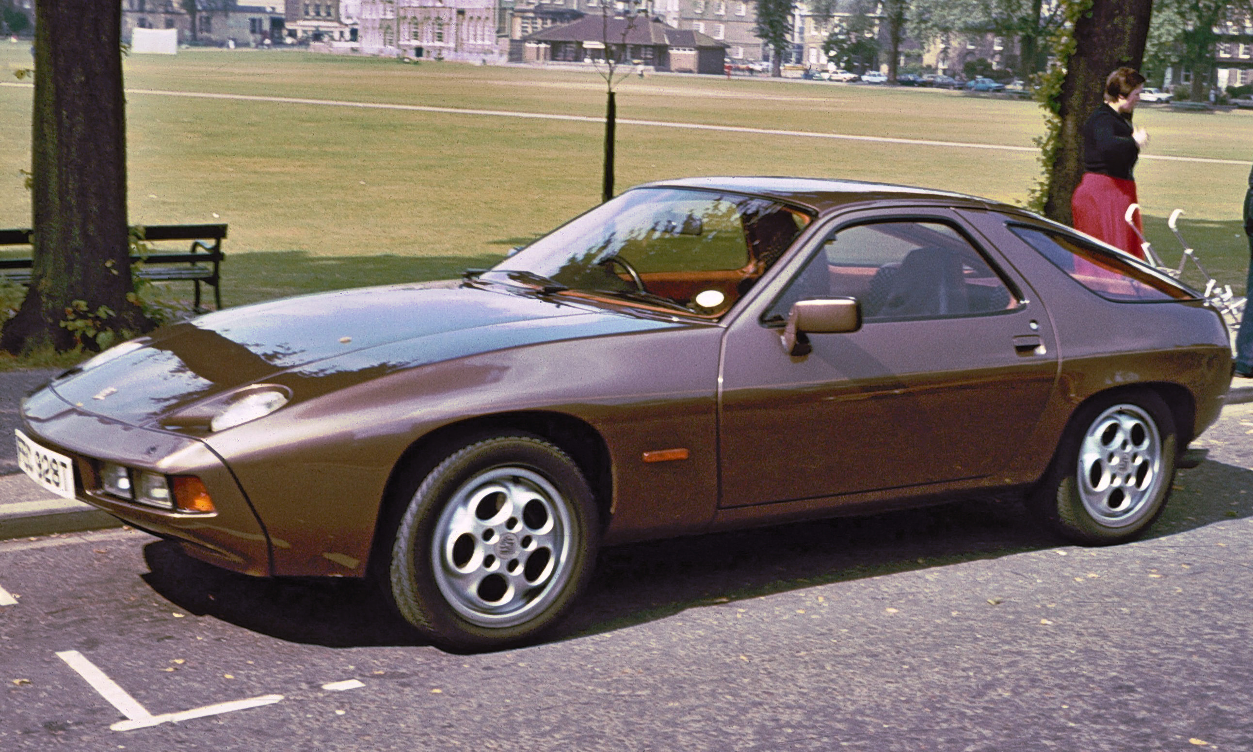 Porsche 928 1981